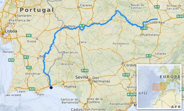 carte réalisée sur umap [1] This map may be incomplete, and may contain errors. Don't rely solely on it for navigation.